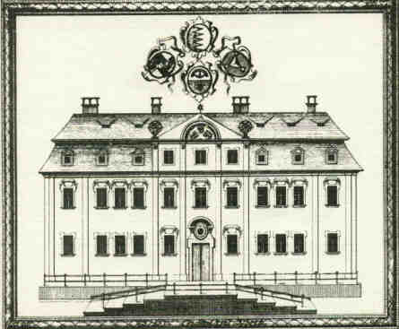 Ansicht der Fassade des Melanchthon-Gymnasiums in Nürnberg. Kupferstich von 1733. Museen der Stadt Nürnberg